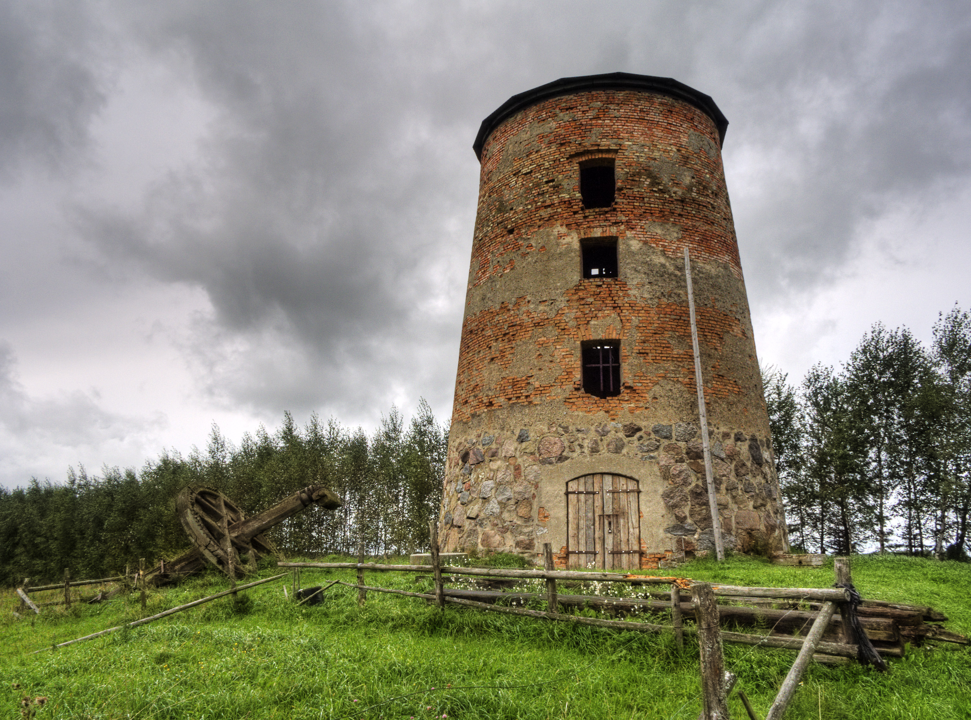 Zrujnowany wiatrak w Grądzkich woj. warmińsko-mazurskie